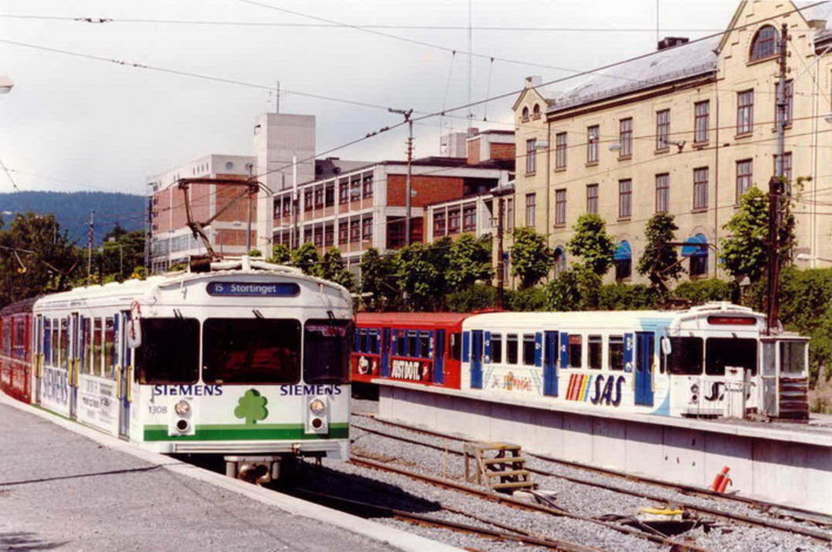 Vogn 1304 med helreklame for SAS og vogn 1308 med helreklame for Siemens. Majorstuen stasjon ca. 1989.